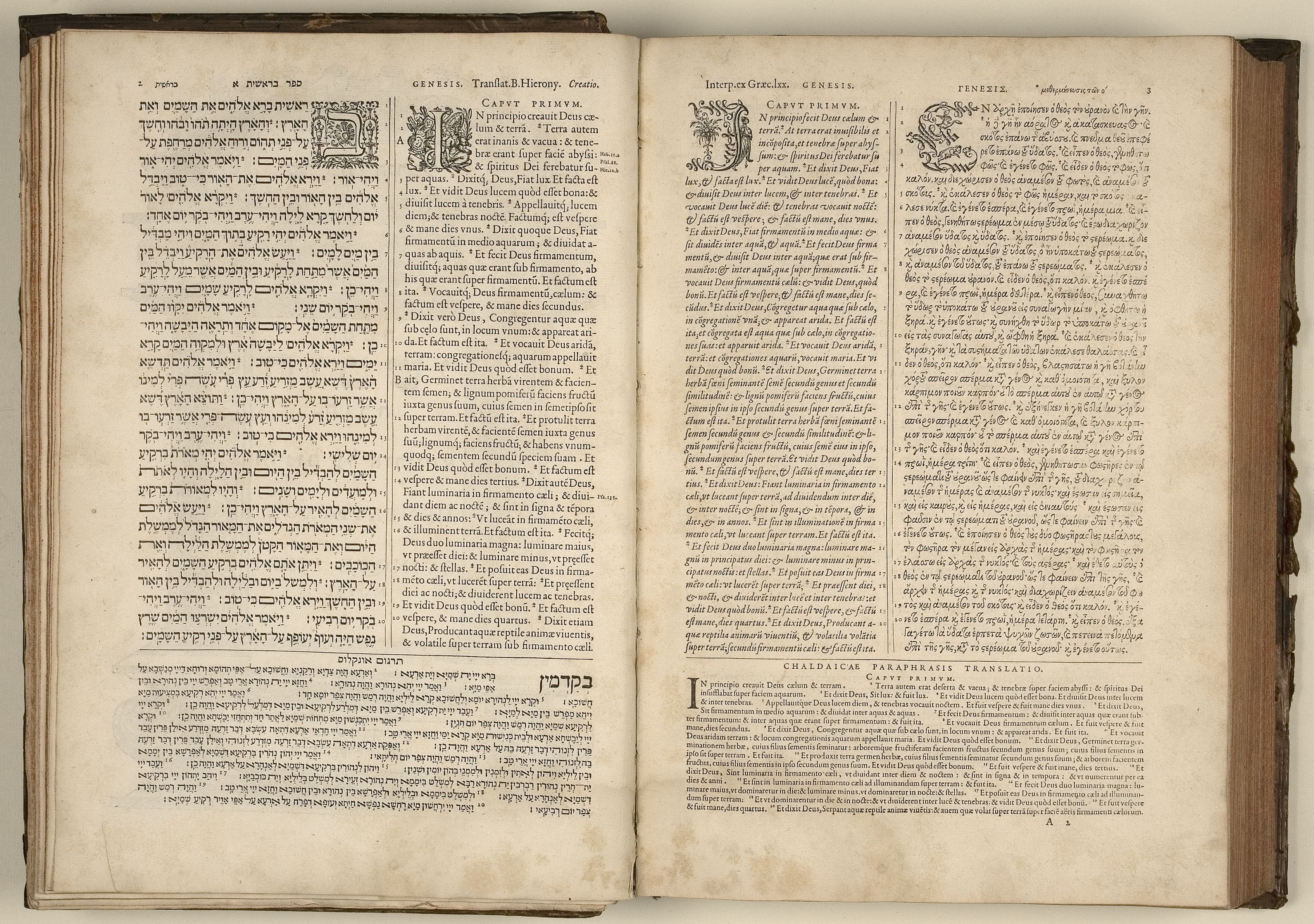 Polyglot, Genesis